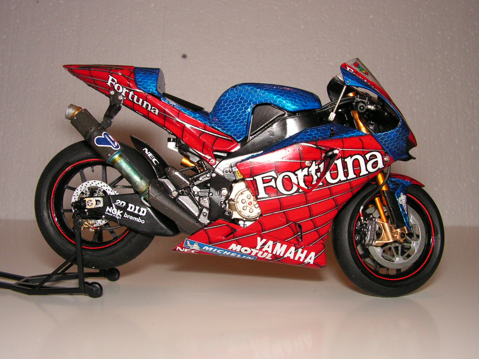 maquette tamiya 1/12 Yamaha YZR M1 Marco Melandri 2004